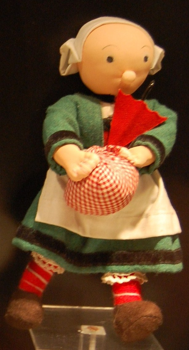 Bécassine